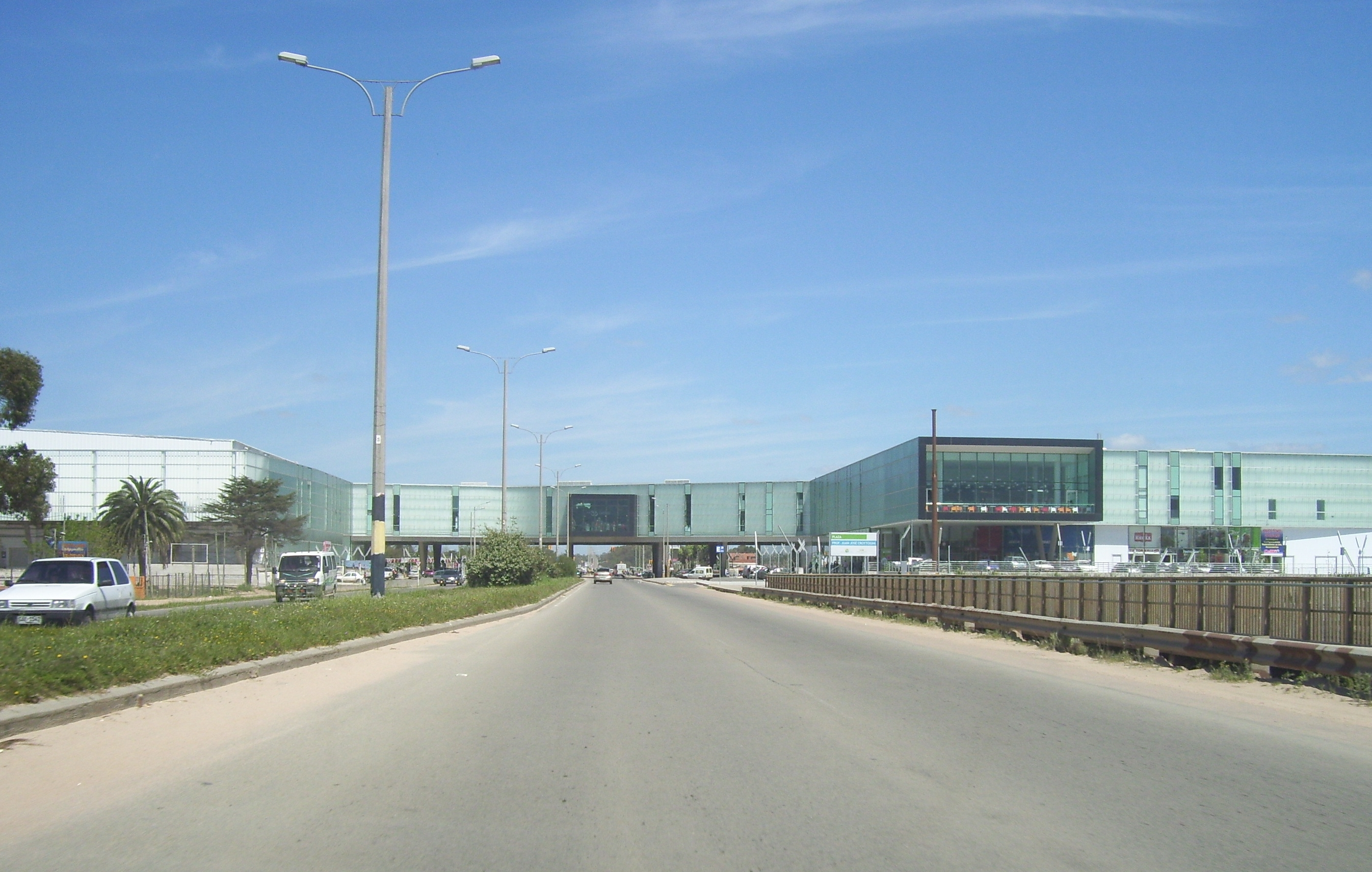 Avenida Giannattasio y Centro Cívico de Ciudad de la Costa. Canelones-Uruguay